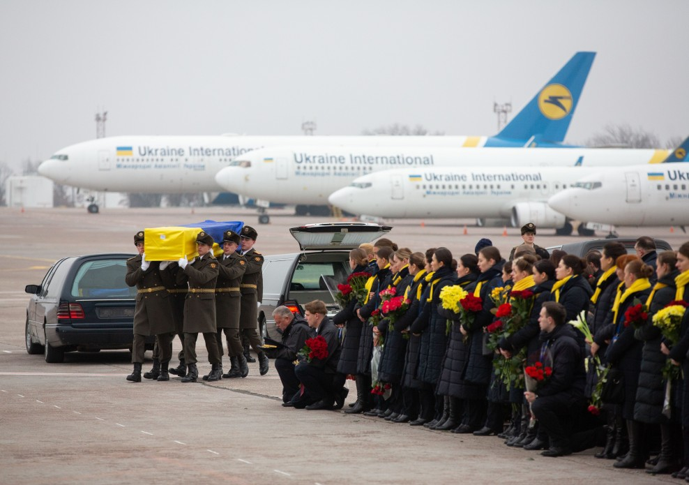 Церемонія вшанування пам’яті загиблих унаслідок авіакатастрофи в Ірані